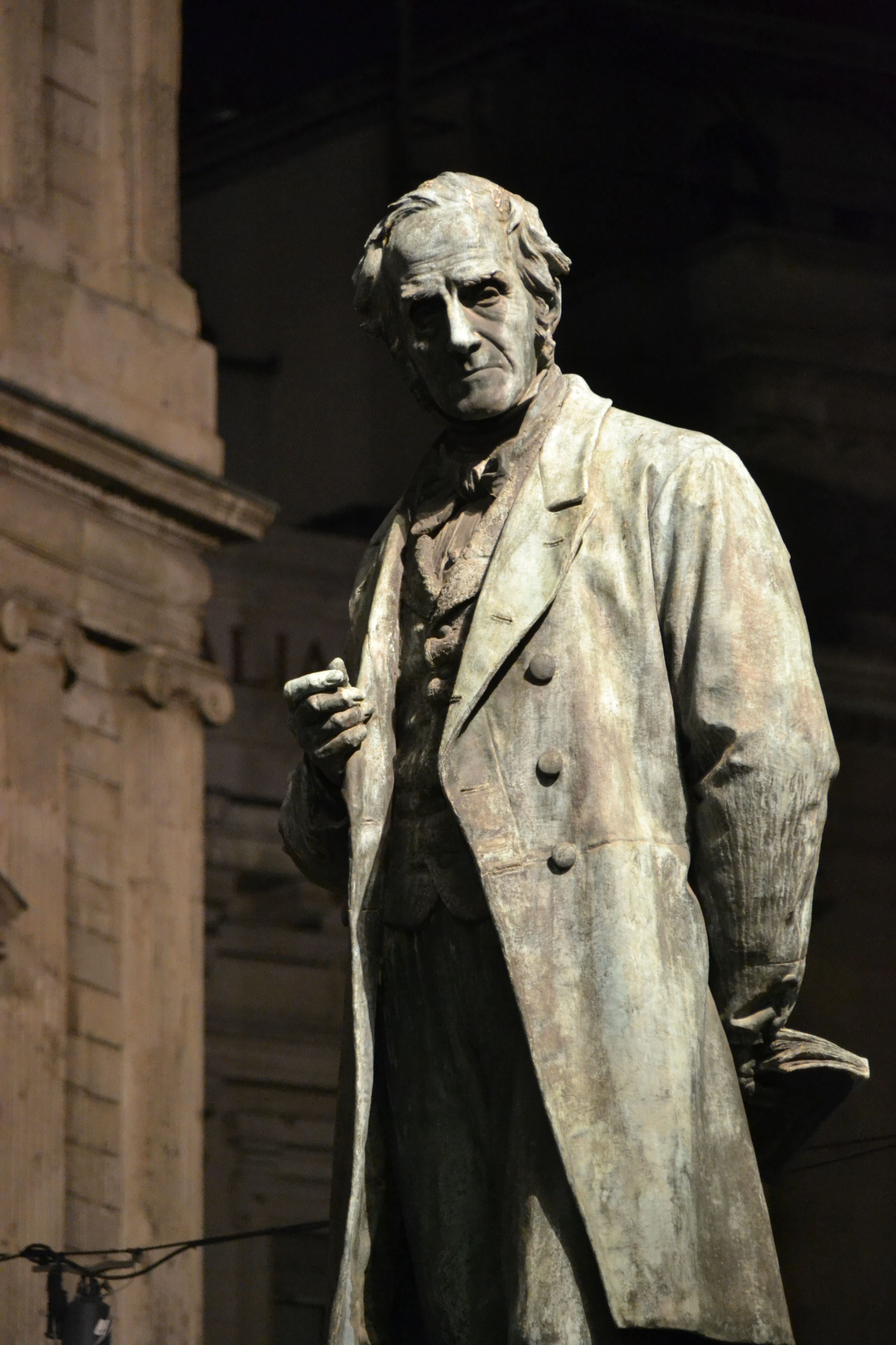 Dettaglio della statua di Alessandro Manzoni a piazza San Fedele This is a photo of a monument which is part of cultural heritage of Italy.